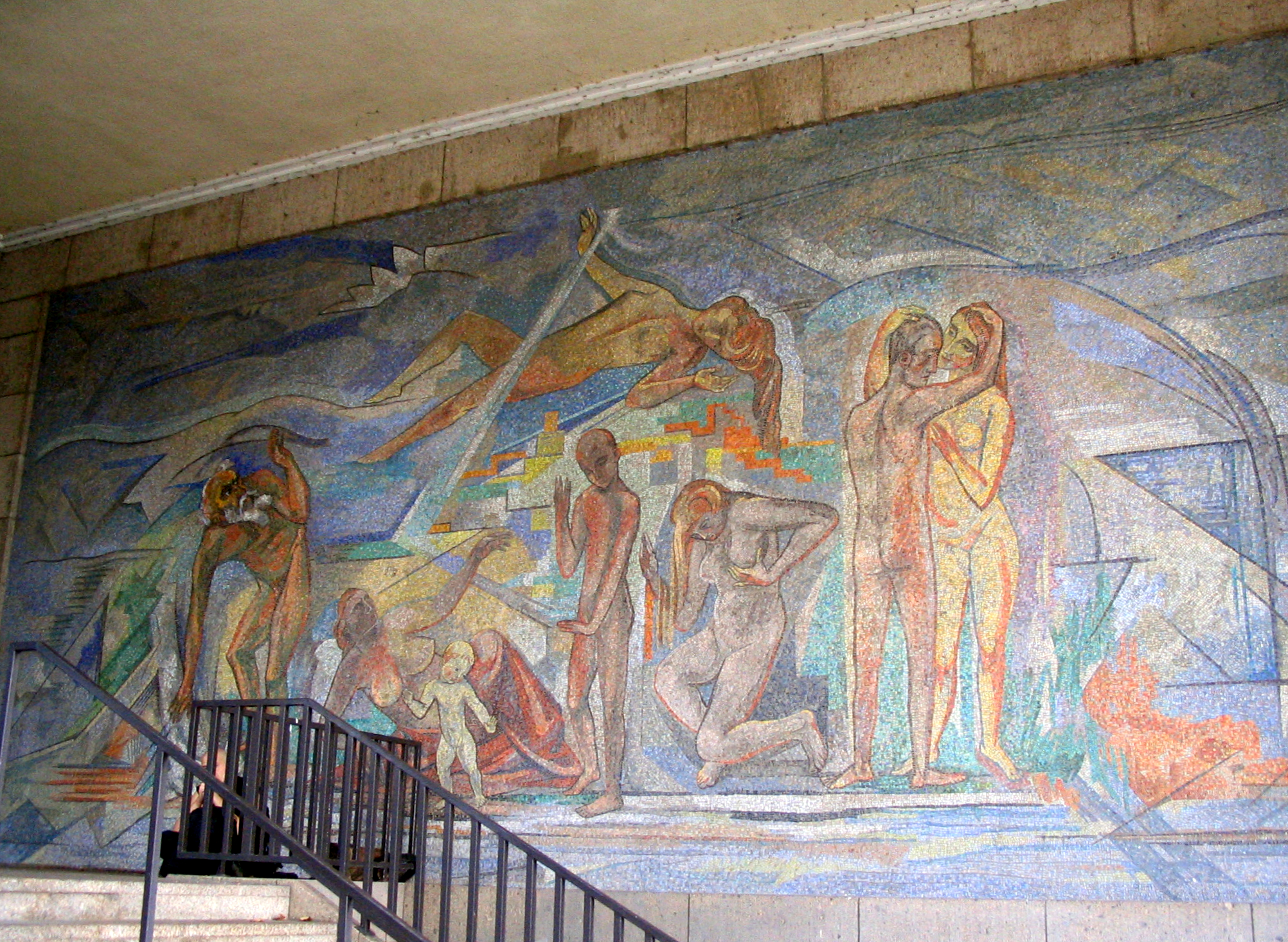 Heinrich Nauen „Der Rhein als Träger des Lebens“. Düsseldorf, westliche Nordseite der Tonhalle. Fünf Mosaiken am Kunstmuseum Süd, Wirtschaftsmuseum Nord und Tonhalle Düsseldorf. Die zwei offenen Ecktempel am Kunstmuseum Süd und Wirtschaftsmuseum Nord, die den Eingang von der Rheinseite zur Inselstraße markieren, werden von jeweils einem Mosaik des Niederländers Jan Thorn Prikker geschmückt, Lehrer an der Kunstakademie Düsseldorf in den 1920er Jahren. Zwei weitere, den anderen gegenüberliegende Ecktempel mit Mosaiken von Heinrich Nauen befinden sich an der Tonhalle West und Ost, außerdem eine am NRW-Forum Süd. Da die Werke von den Nationalsozialisten als entartet eingestuft worden waren, hatte das Hochbauamt die großflächigen Arbeiten mit einer in einigen Zentimetern Abstand angebrachten Rabitz-Putzwand überdeckt, wodurch sie die kritische Zeit überdauerten.